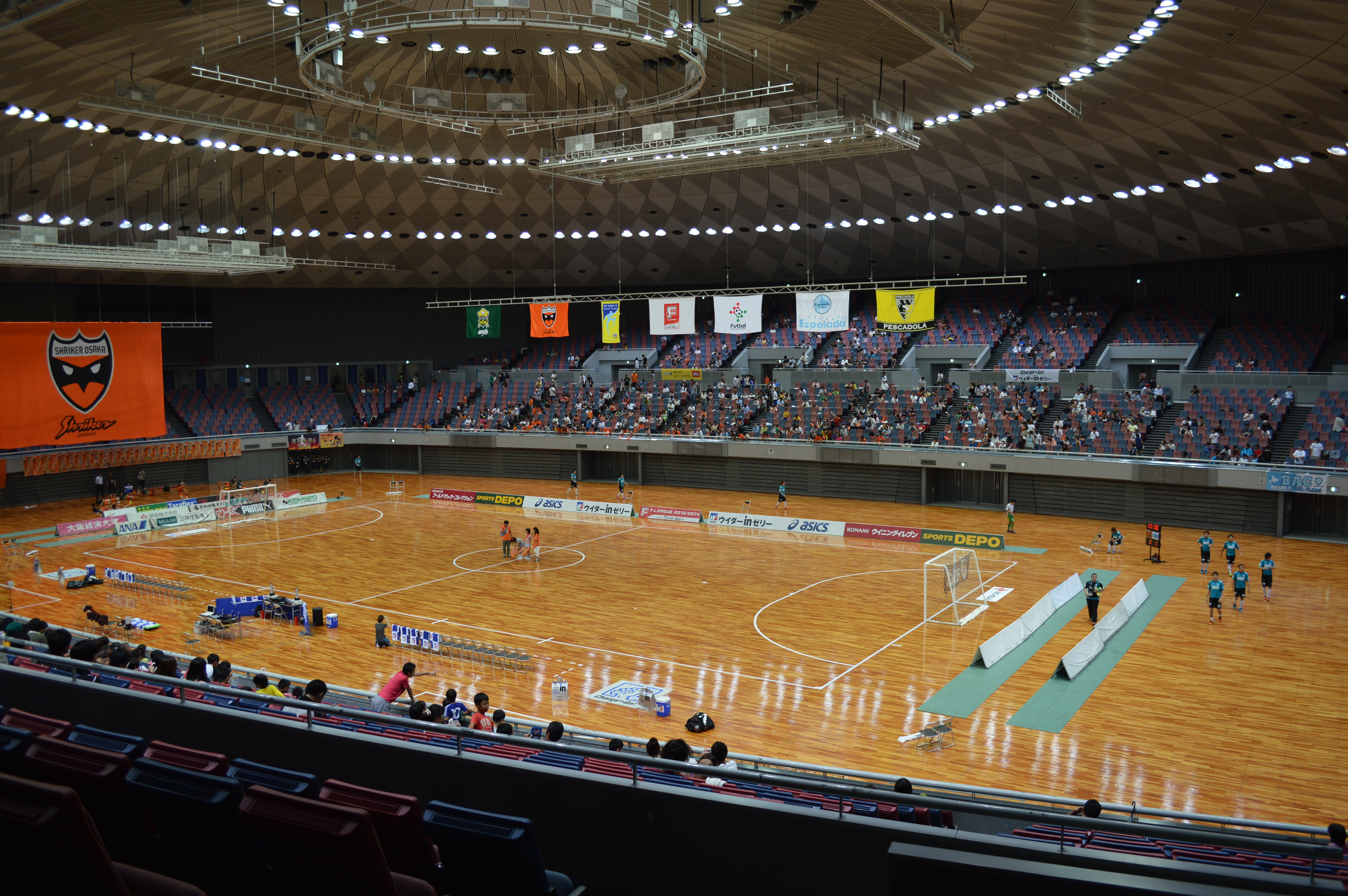 大阪市港区にある大阪市中央体育館、Fリーグ開催時